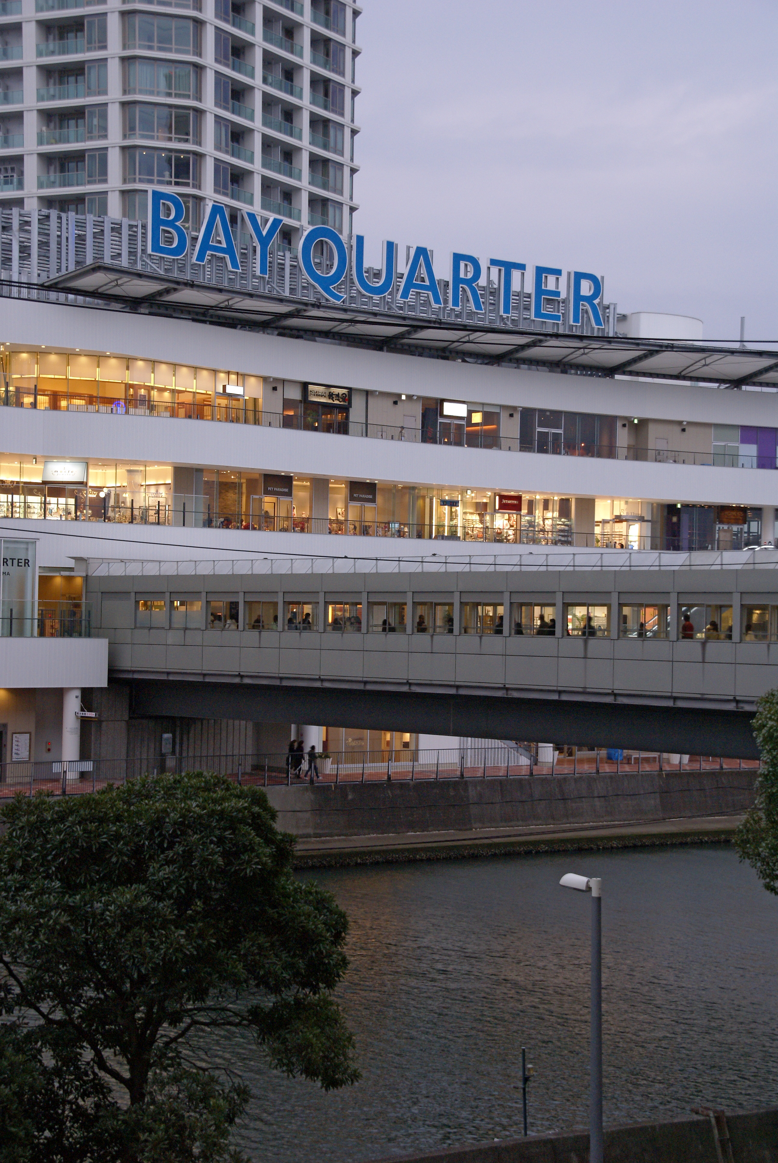 Yokohama bay quarter in Yokohama, Japan